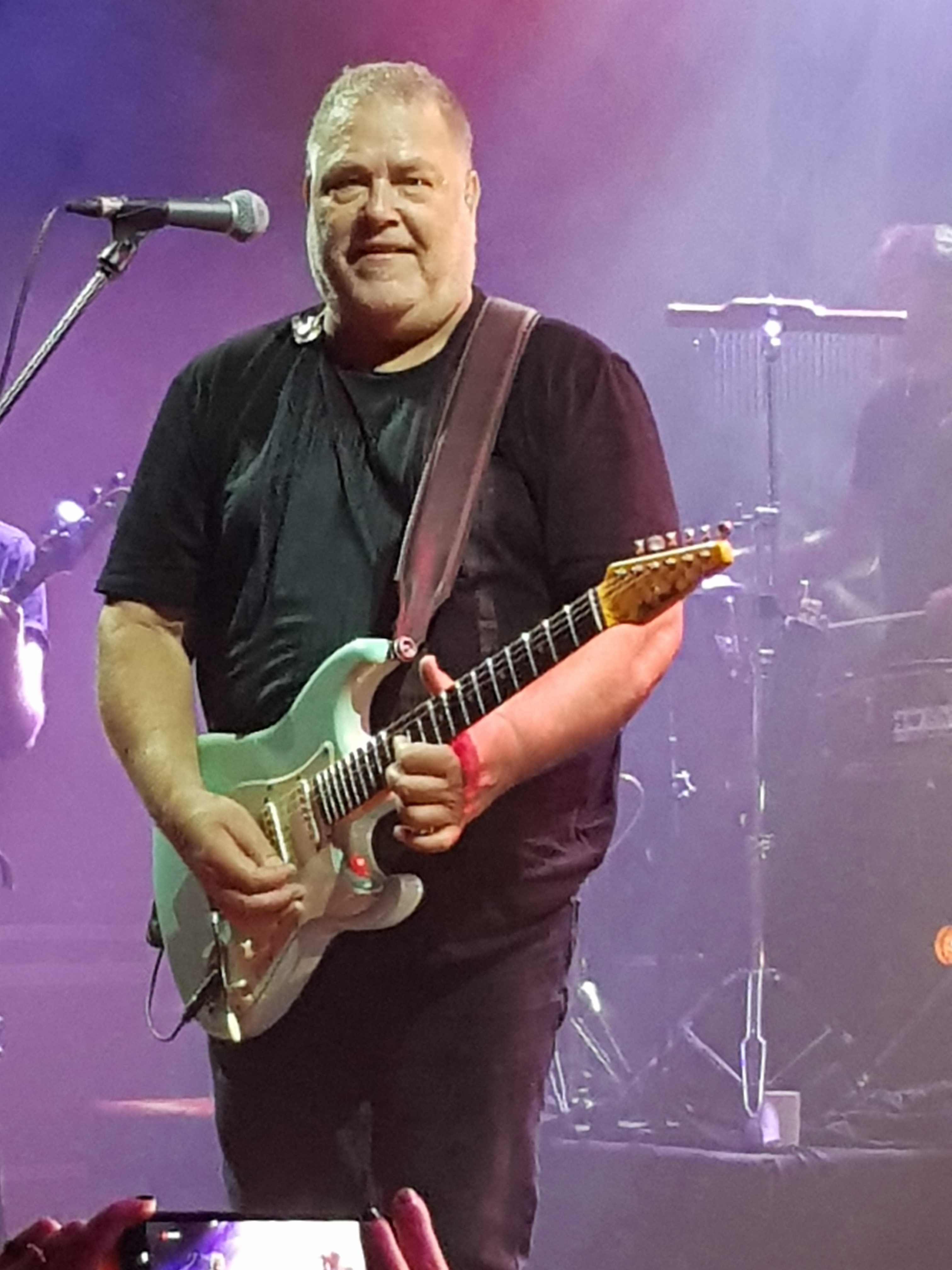 יהודה פוליקר בהופעה בקיבוץ חצור